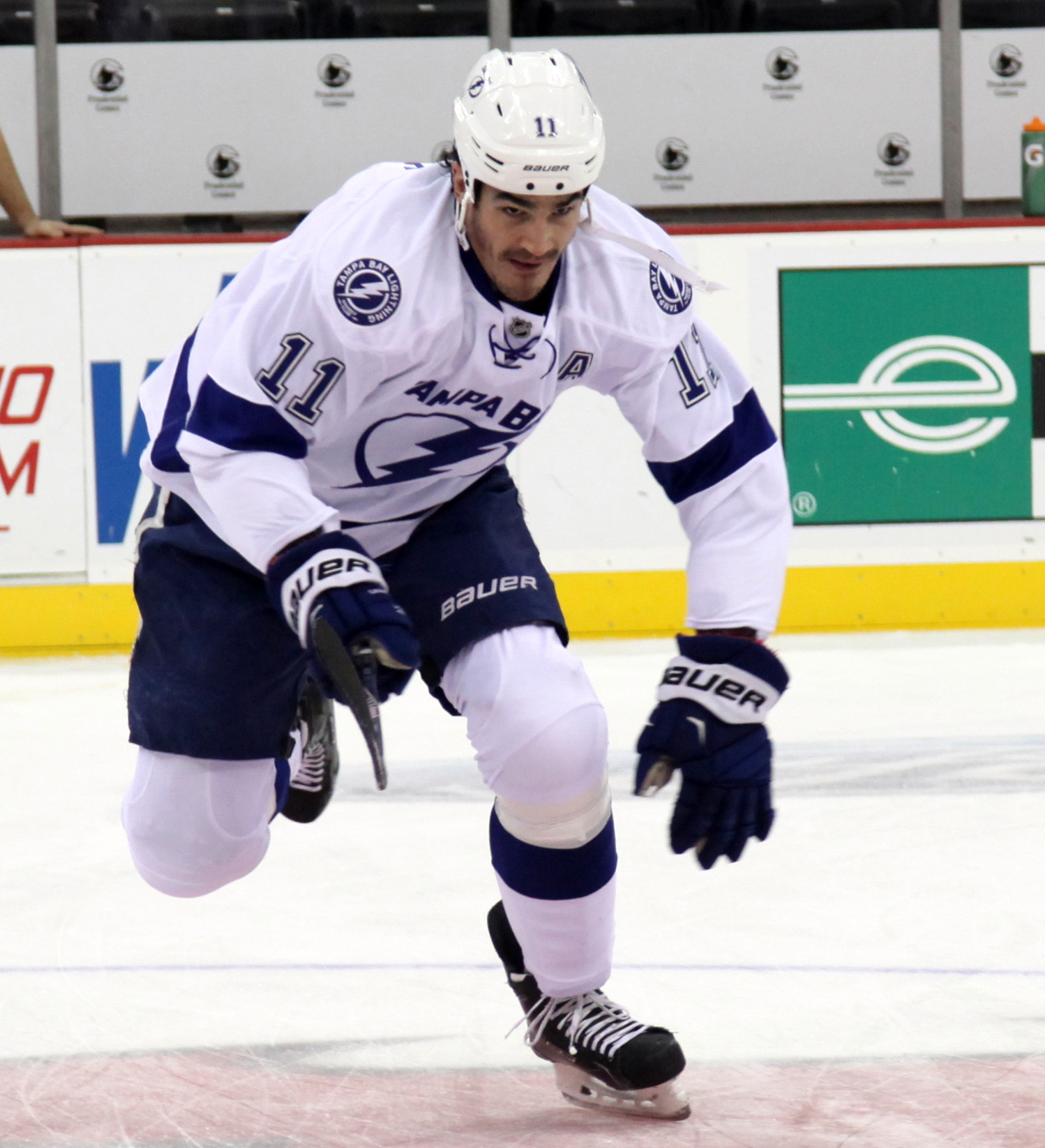 Boyle in December 2014.